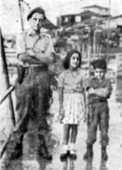 Jorge Ricardo Masetti con sus hijos